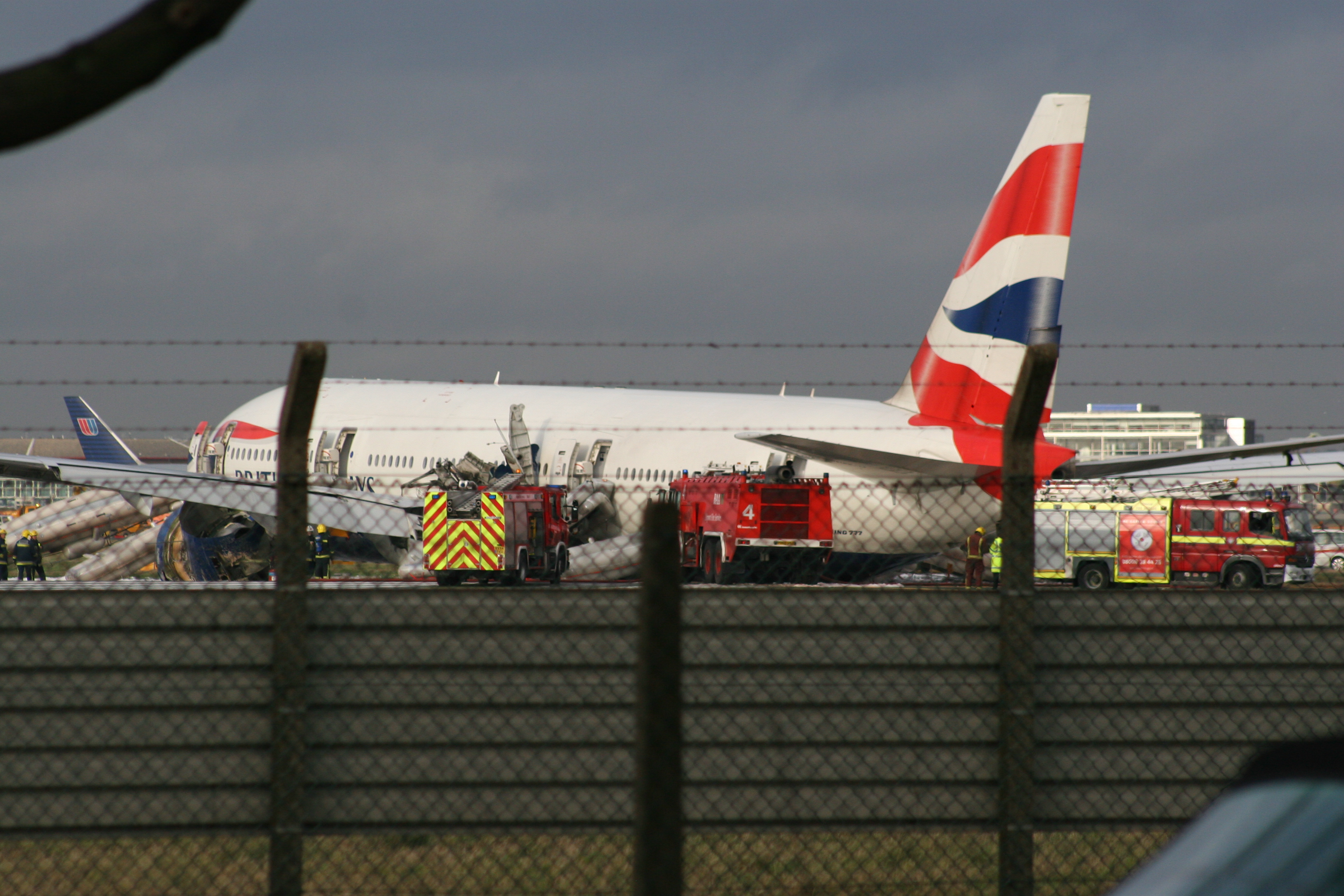 taken 20 mins after short landing